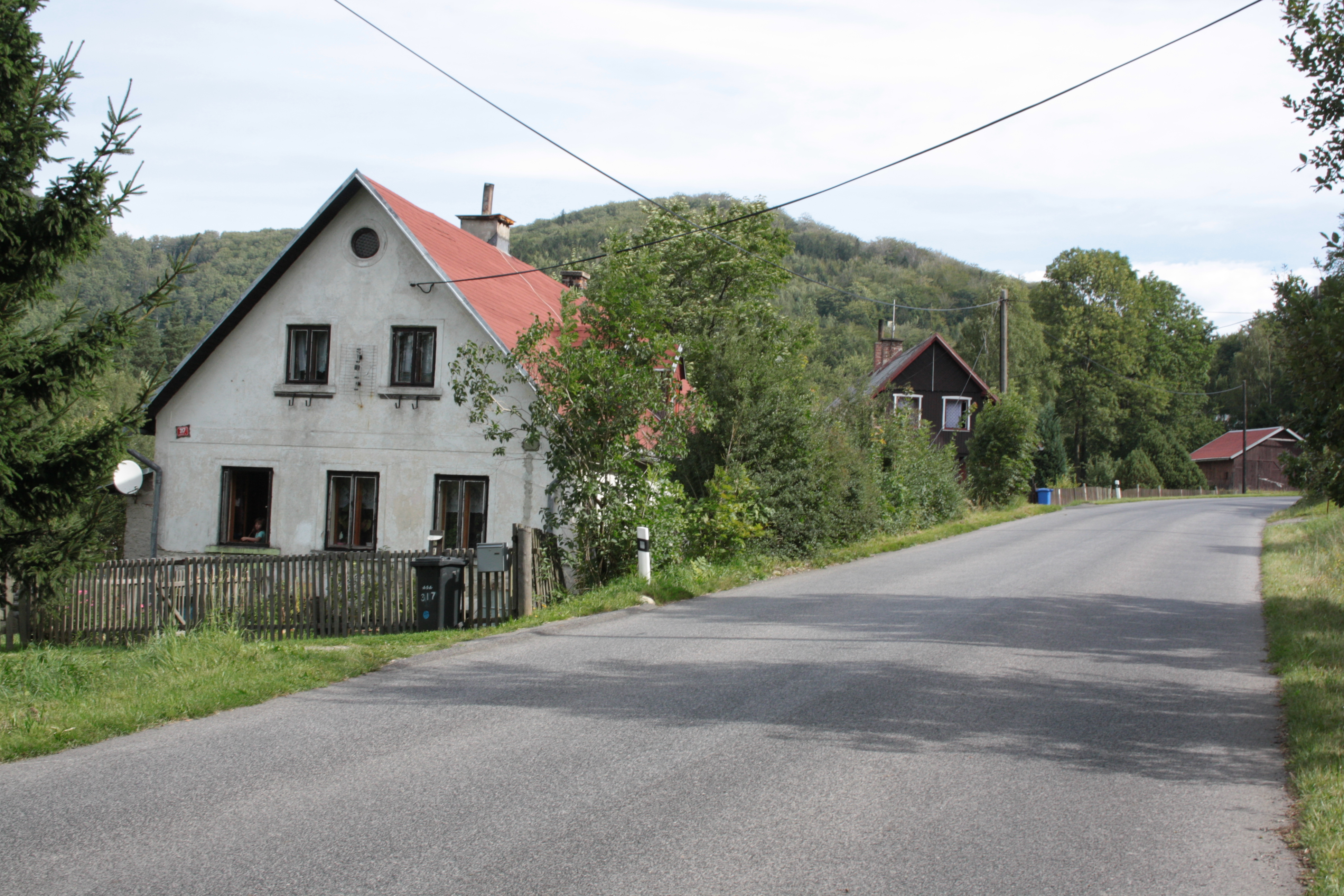 This photograph was taken with a DSLR from WMCZ's Camera grant. Dům číslo popisné 317 ve Filipce, součásti Oldřichova v Hájích v okrese Liberec.